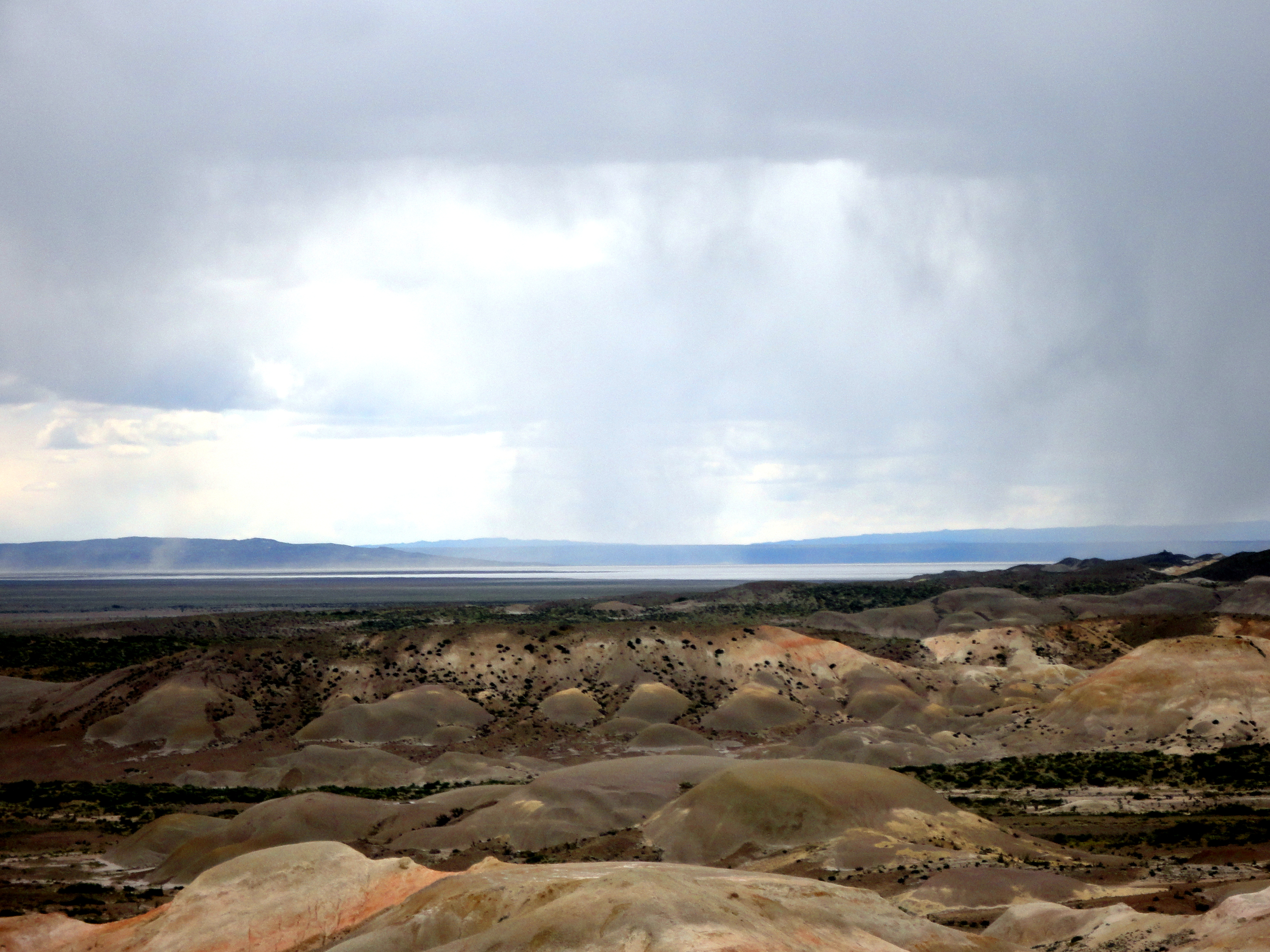 Desde la ruta 26 la inmensidad del lago Colhue Huapi